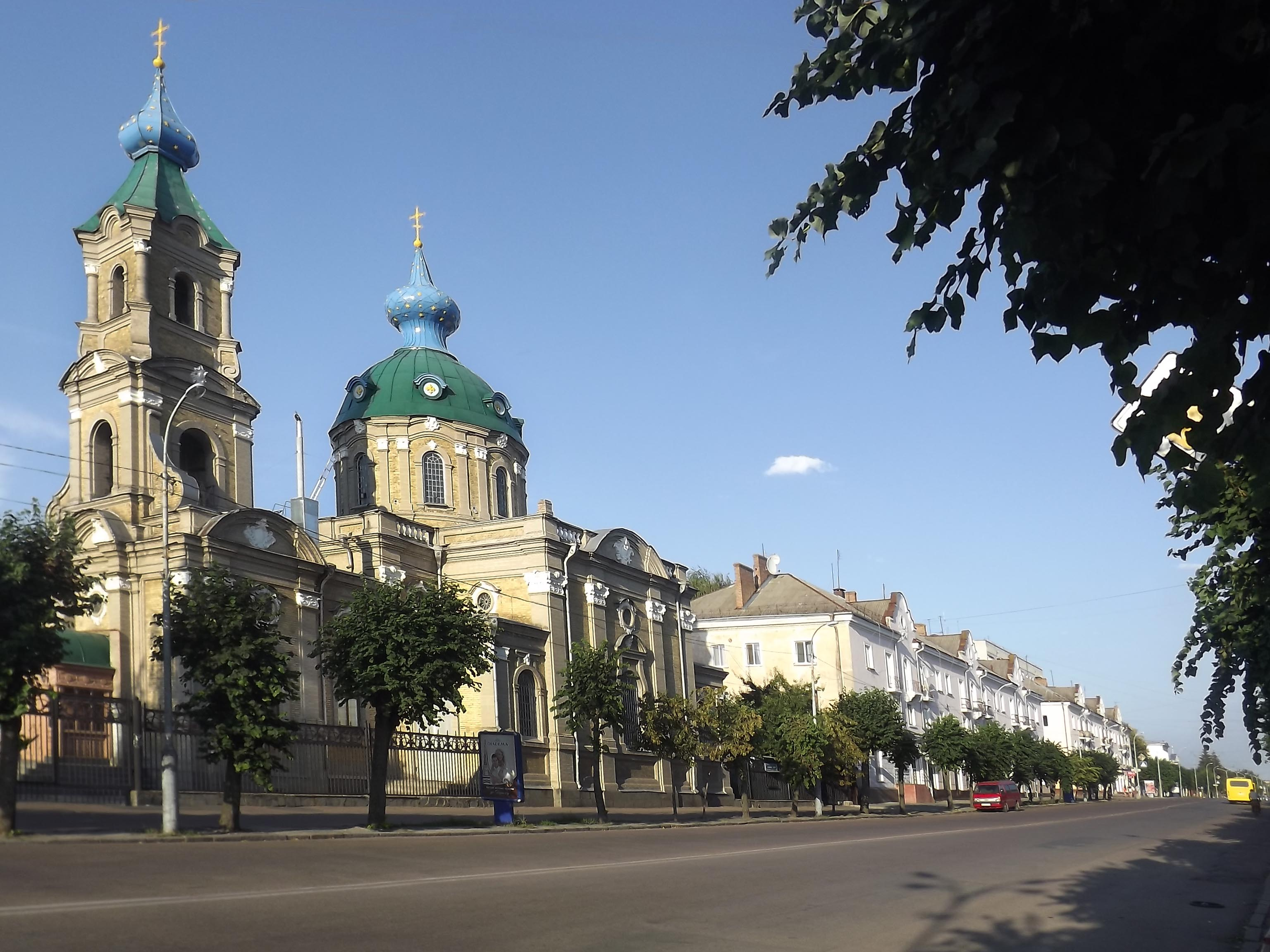 м. Бердичів ул. К. Либкнехта, 7 Головний православний храм Бердичева споруджений на місці дерев'яної церкви Св. Миколая, яка була побудована в 1748 р